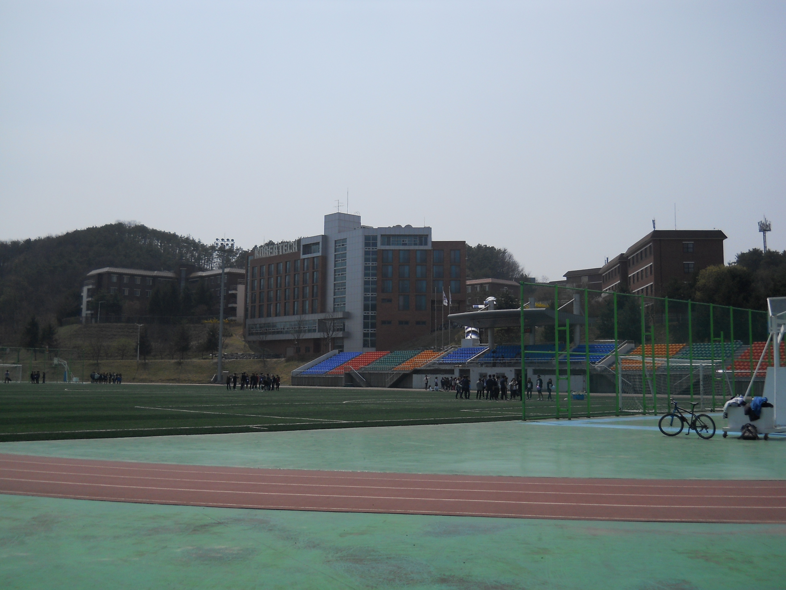 2015년 4월 운동장에서 바라본 생활관 본관동 전경